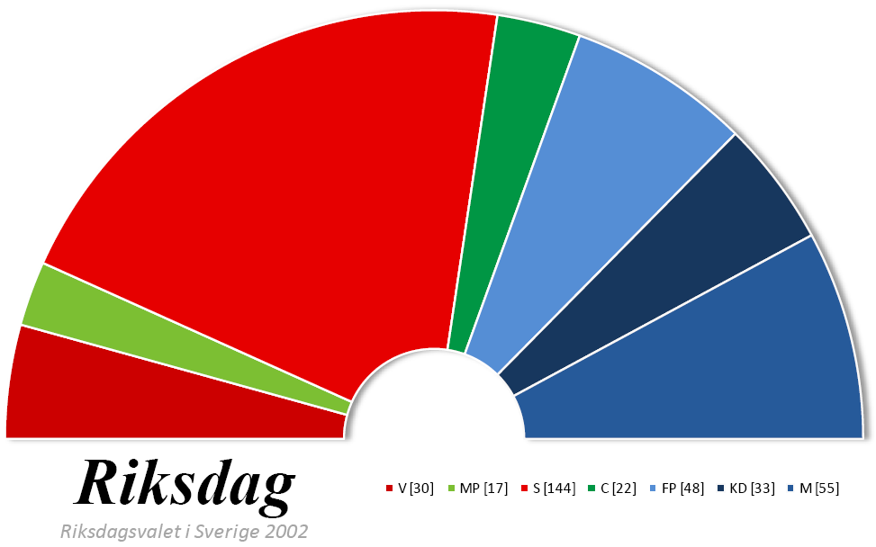 Composition du parlement suédois après les élections générales de 2002.